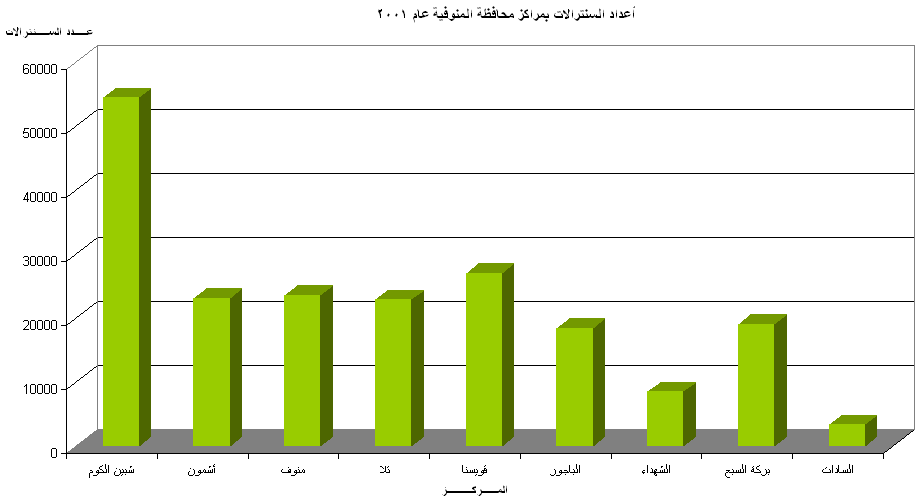 أعداد السنترالات بمراكز المنوفية عام 2001